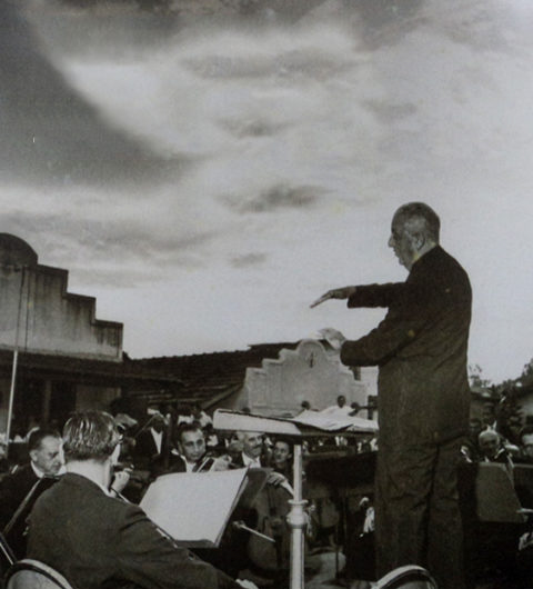 Mignone conducts OSN in 1962